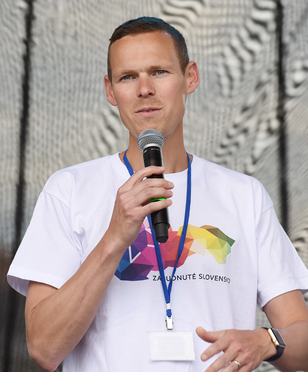 Matej Tóth